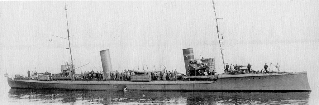 Эскадренный миноносец «Бдительный», 1905-1917 гг.